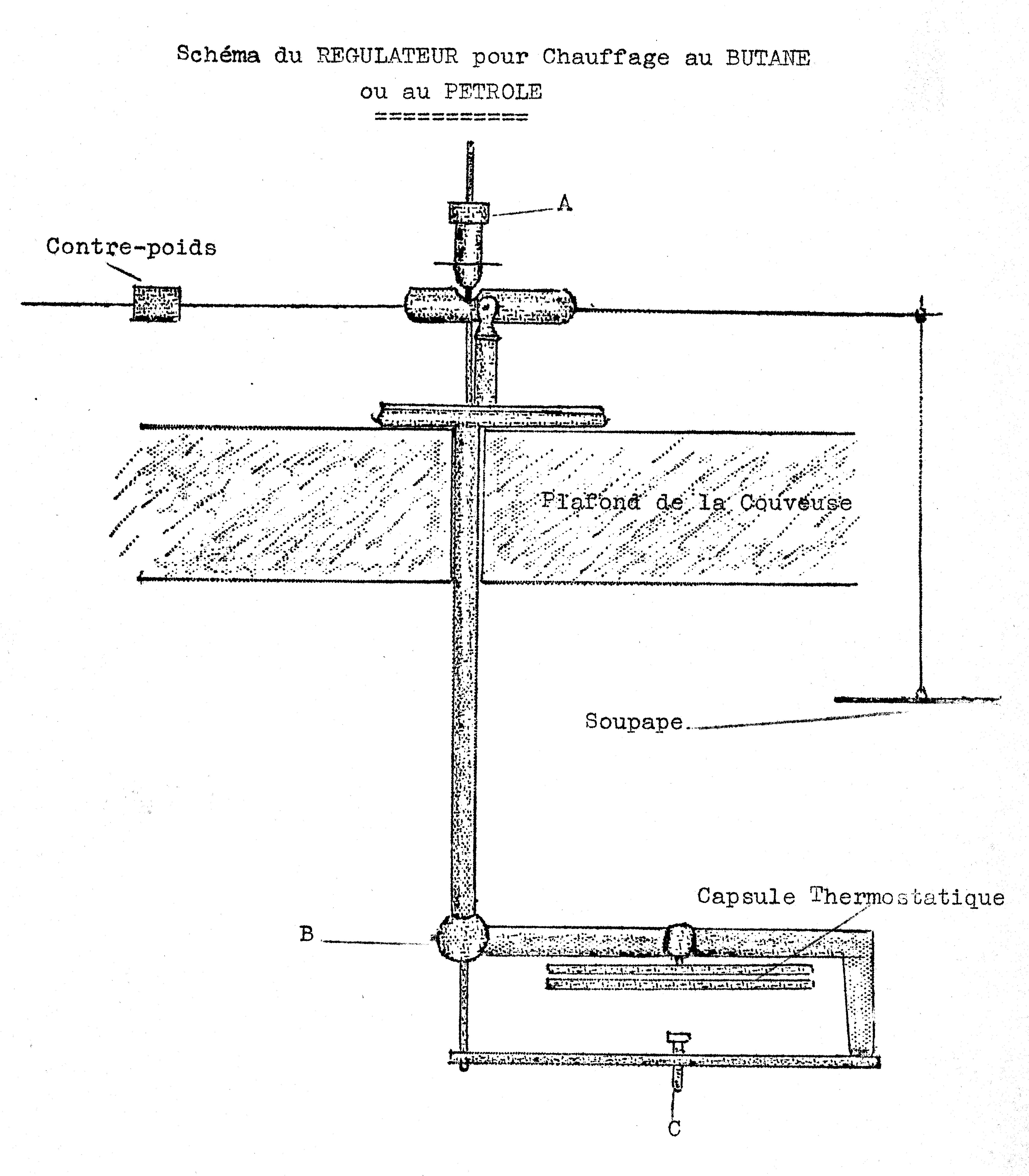 Schéma du régulateur. Extrait des instructions pour le montage et le fonctionnement des couveuses au chauffage au butane ou au pétrole. Brechemier et fils, Chateau-Renault.